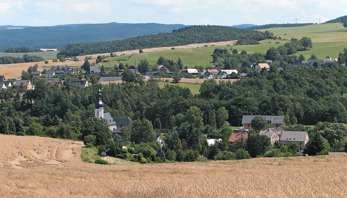 Beschreibung: Ortsteil Weißbach von Langenweißbach im Erzgebirge Fotograf: Darkone, 31. Juli 2005